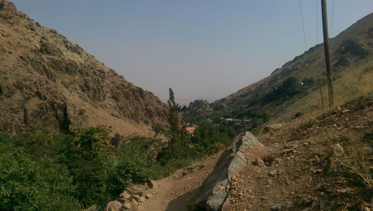 محور رود دره دربند